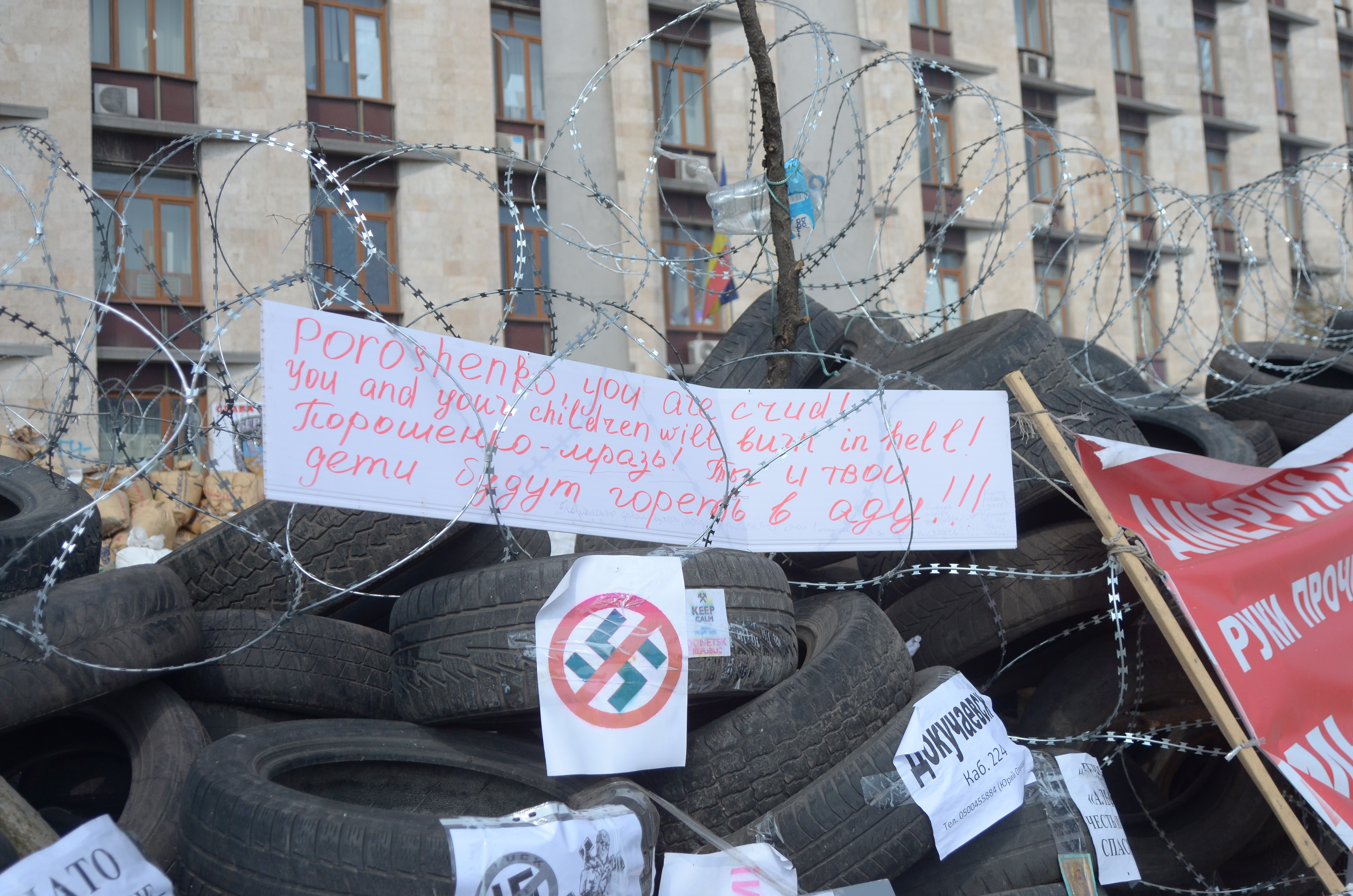 Протесты в Донецке